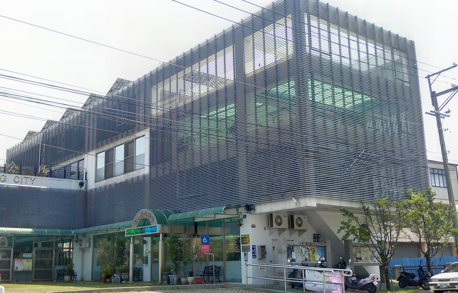 中文（台灣）: 臺中市石岡區公所。